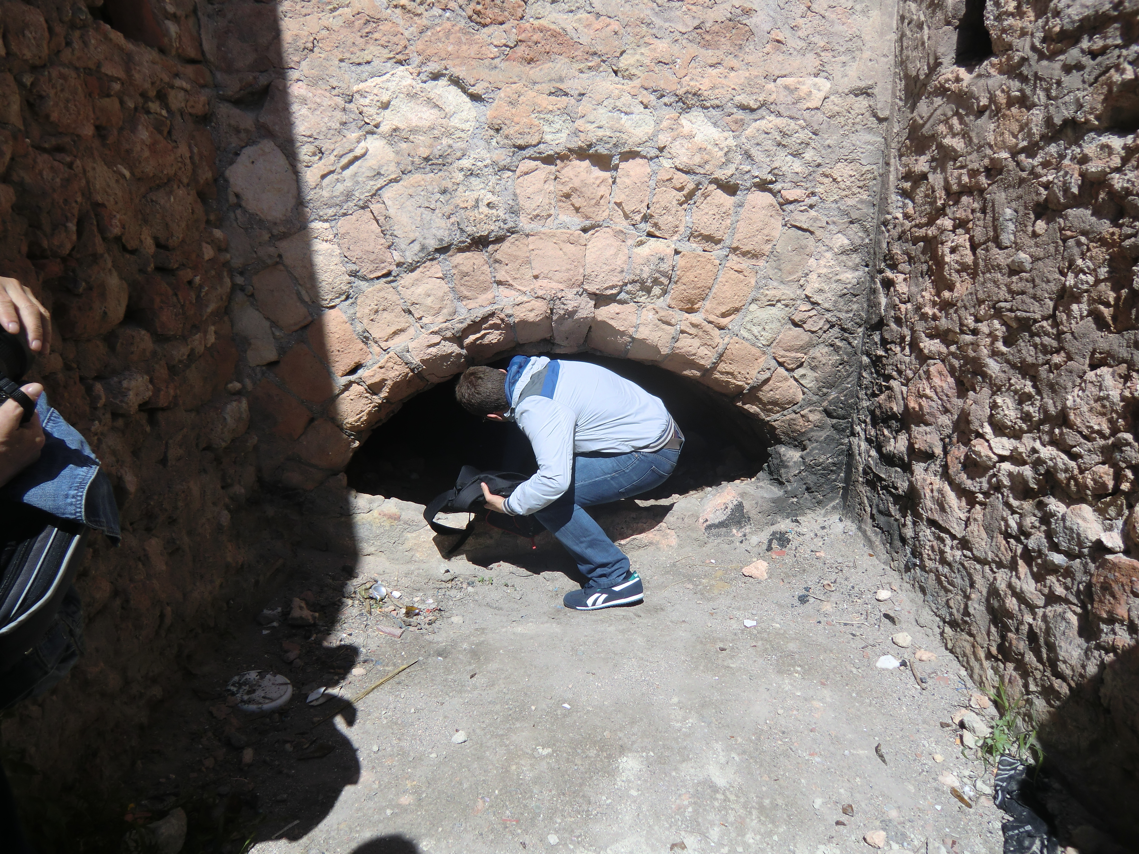 Foto en La Chanca